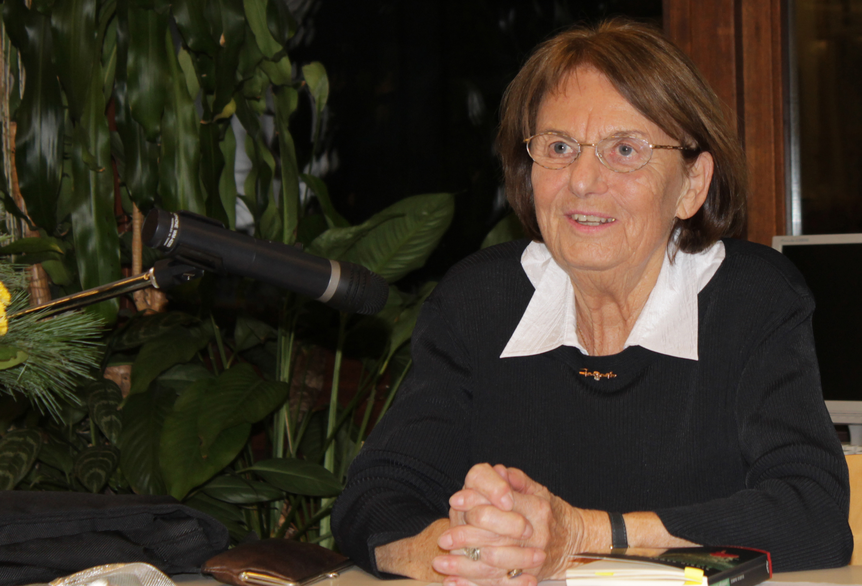 Schriftstellerin Sigrid Ramge, Lesung in der Stadtteilbücherei Stuttgart-Feuerach